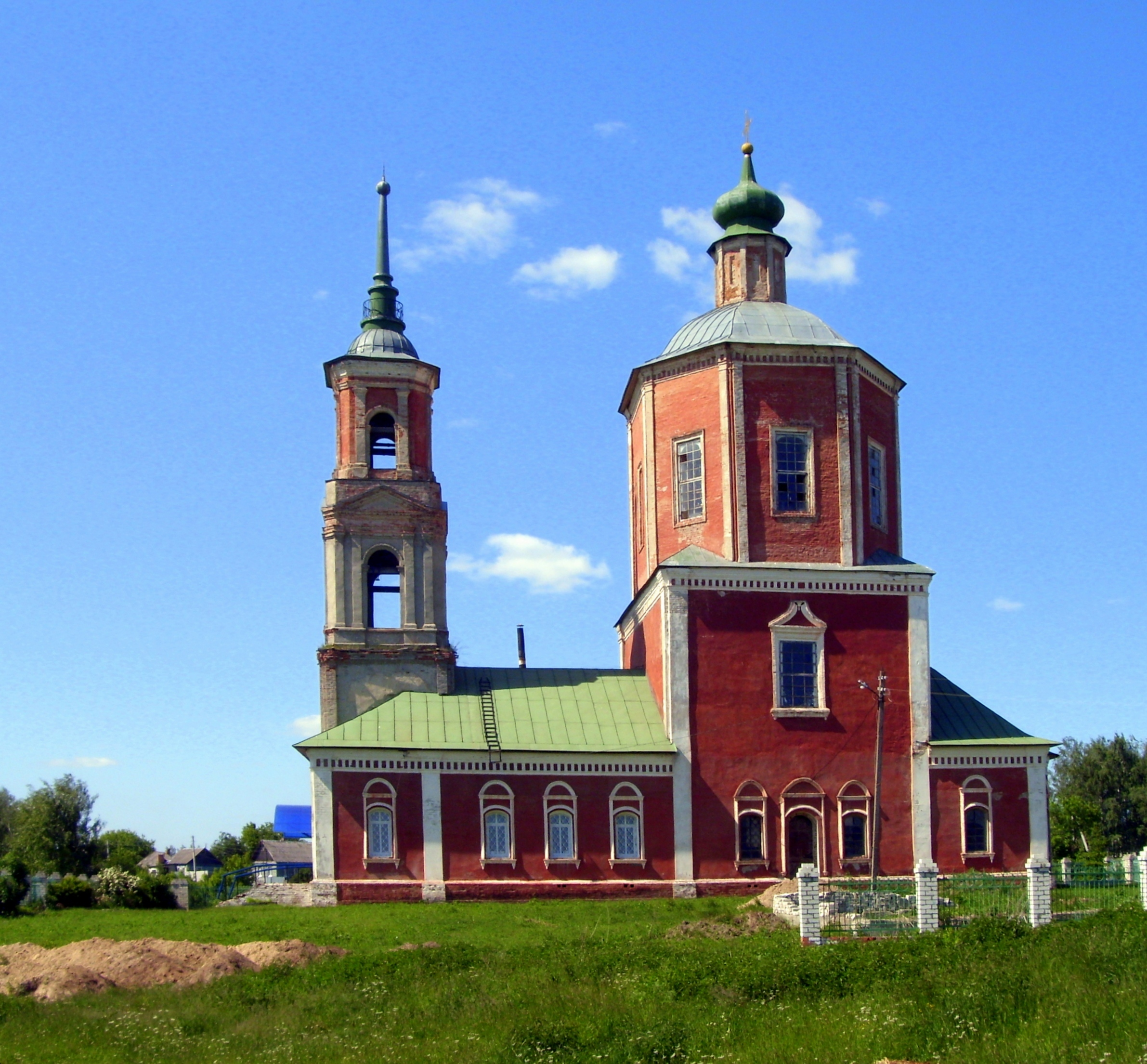 Казанская церковь (Брянская область, Жуковка, село новоселки)